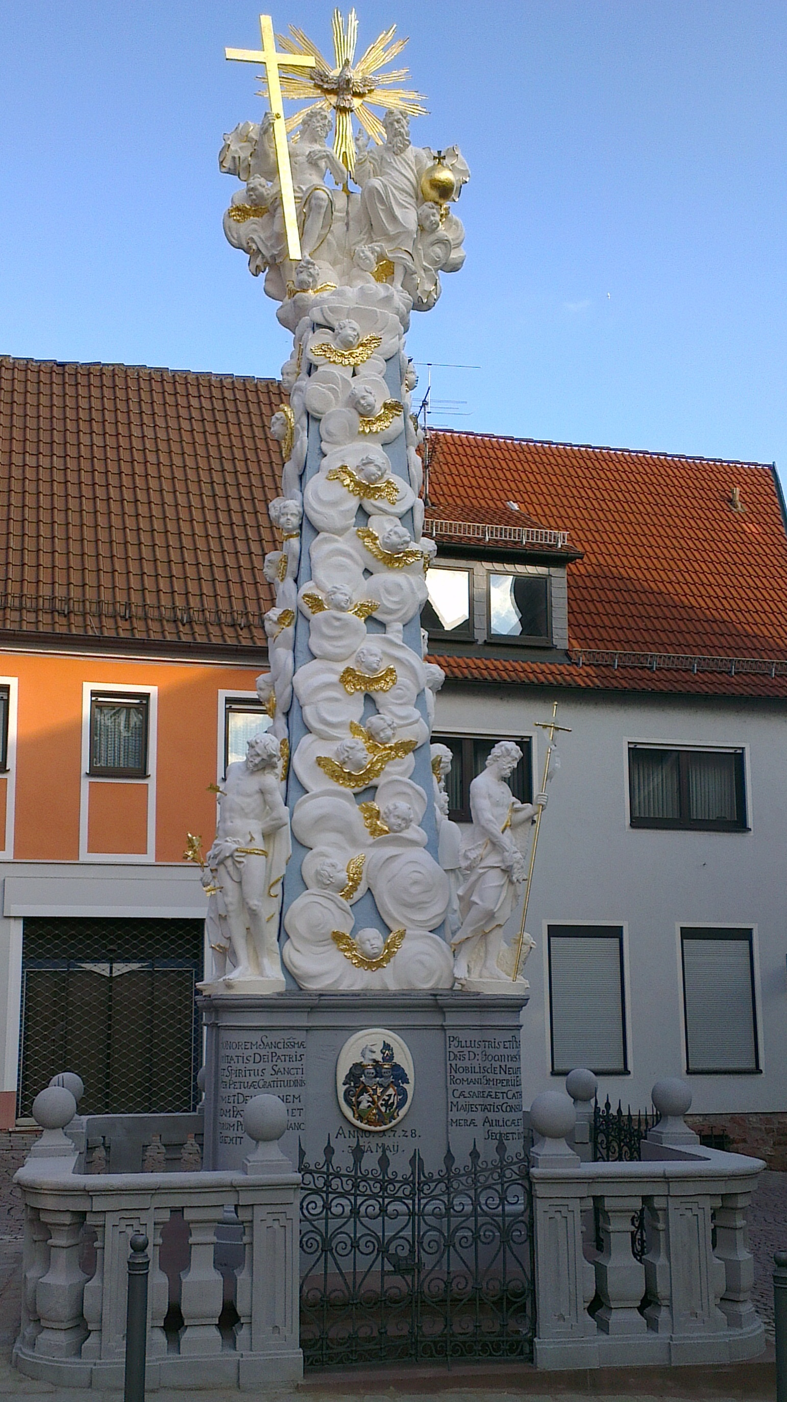 Dreifaltigkeitssäule This is a photograph of an architectural monument.